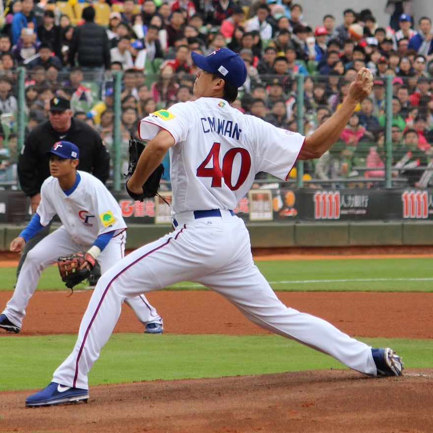 Chien-Ming Wang